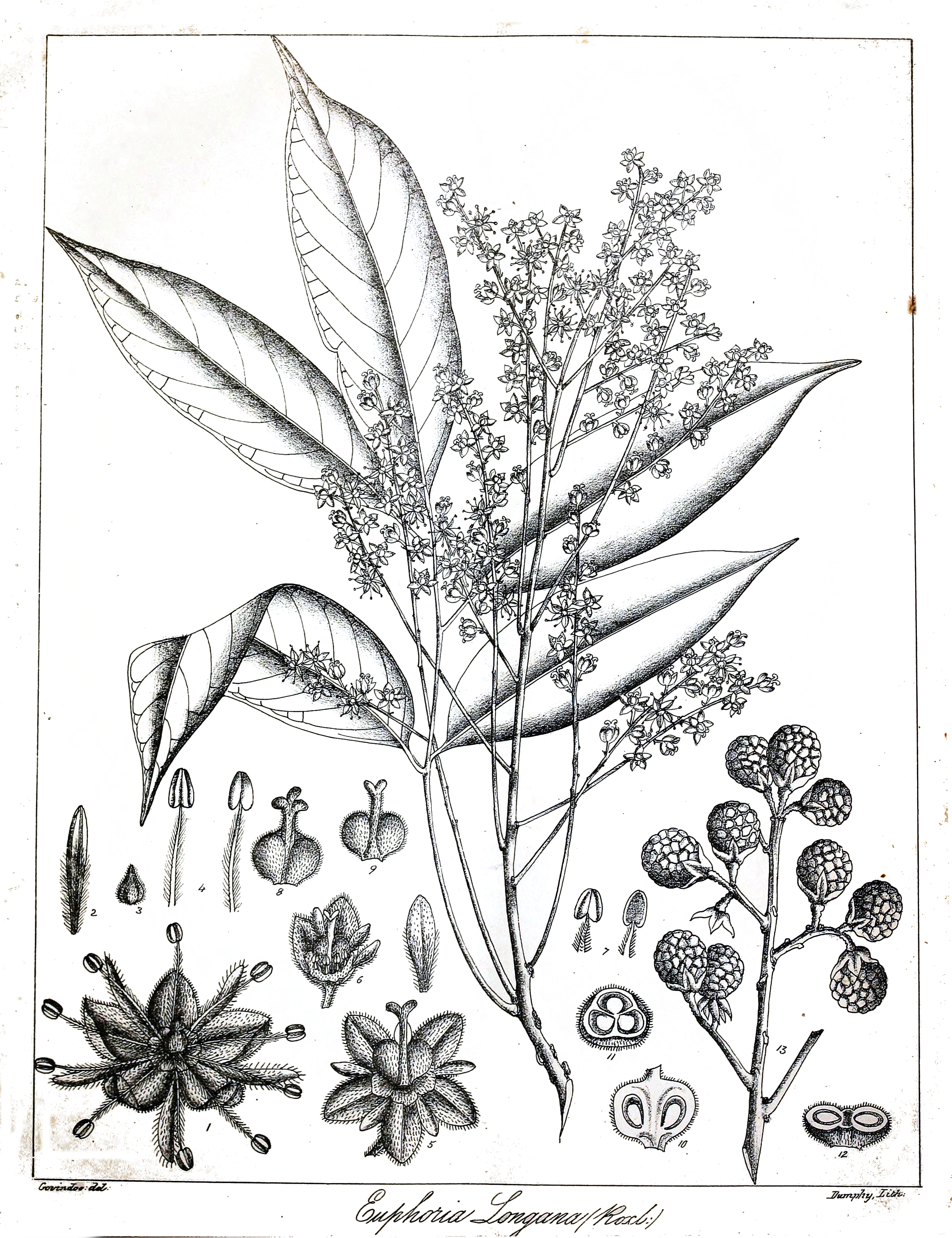 Euphoria longana